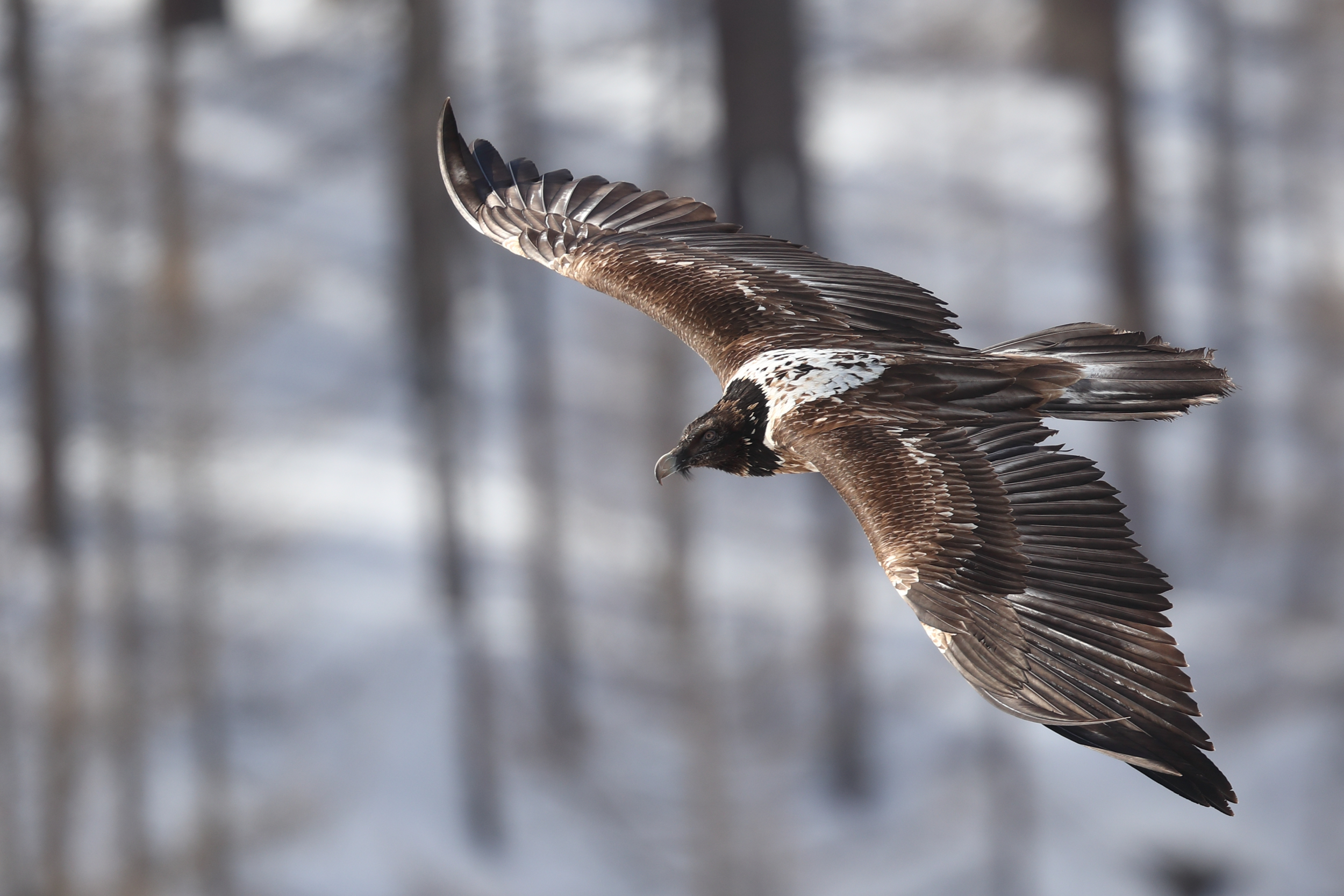 Parco nazionale del Gran Paradiso (Q847690)